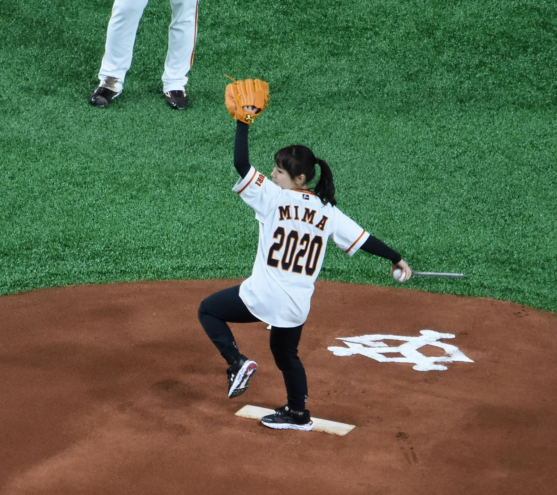 始球式で球を投げる卓球日本代表の伊藤美誠。東京ドームにて。 Nikon D3400